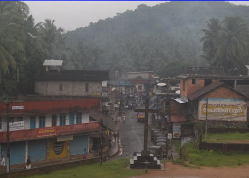 കൂരാച്ചുണ്ട് അങ്ങാടിയുടെ ഒരു വിദൂര ദ്ര്യശ്യം